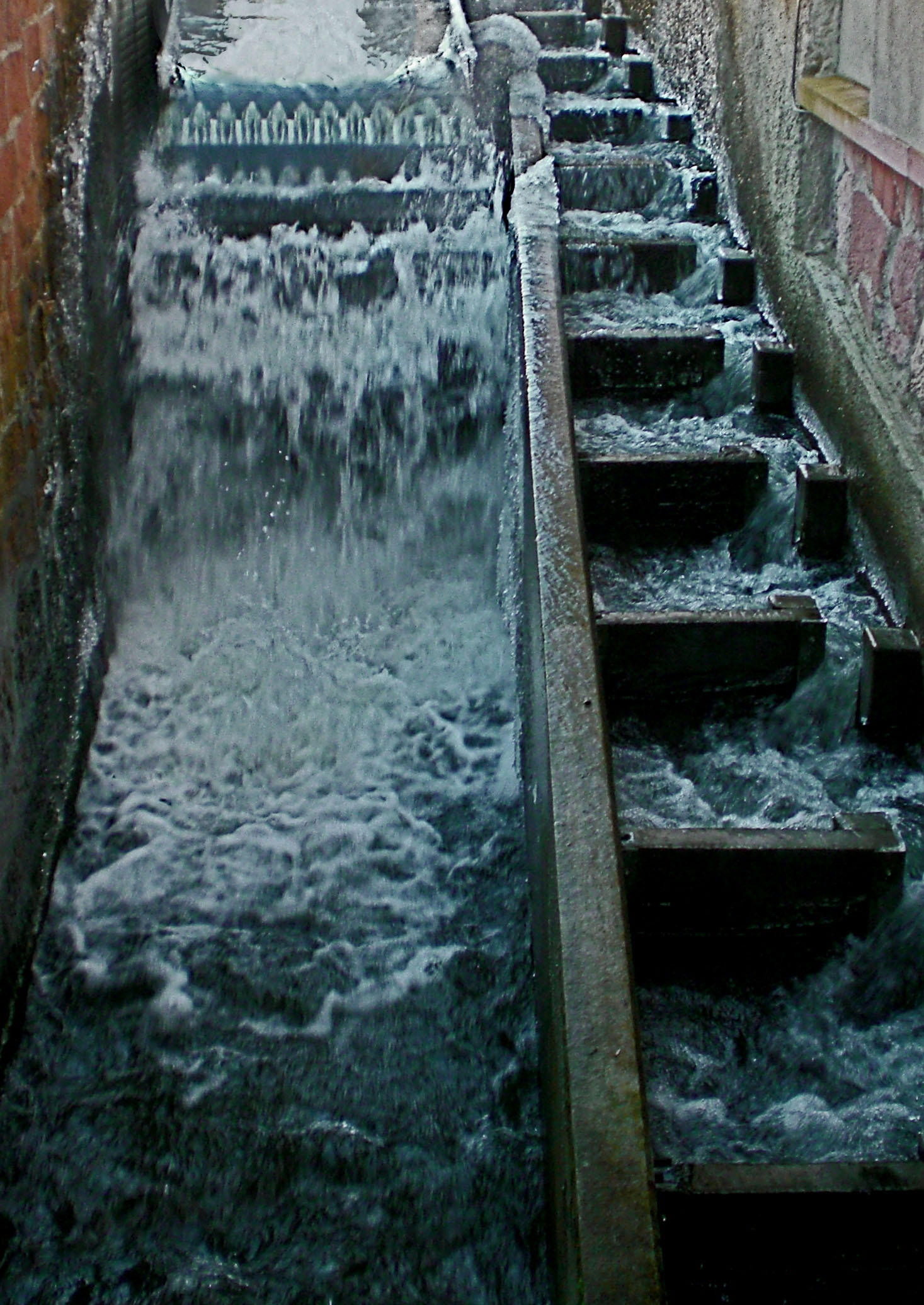 An der Stelle, wo für die frühere Zigarrenfabrik mit einer „Saaler Turbine“ der erste elektrische Strom in Denzlingen erzeugt wurde, wird jetzt wieder regenerative Energie gewonnen und für das Rocca-Areal genutzt. Das Wasserrad hat einen Durchmesser von 1,80 m mit einer Leistung von 4,0 kW und einem zu erwartenden Jahresertrag von ca. 20.000 kWh. Eine Fischtreppe sorgt dafür, dass die Fische das Kraftwerk unbeschadet passieren können.